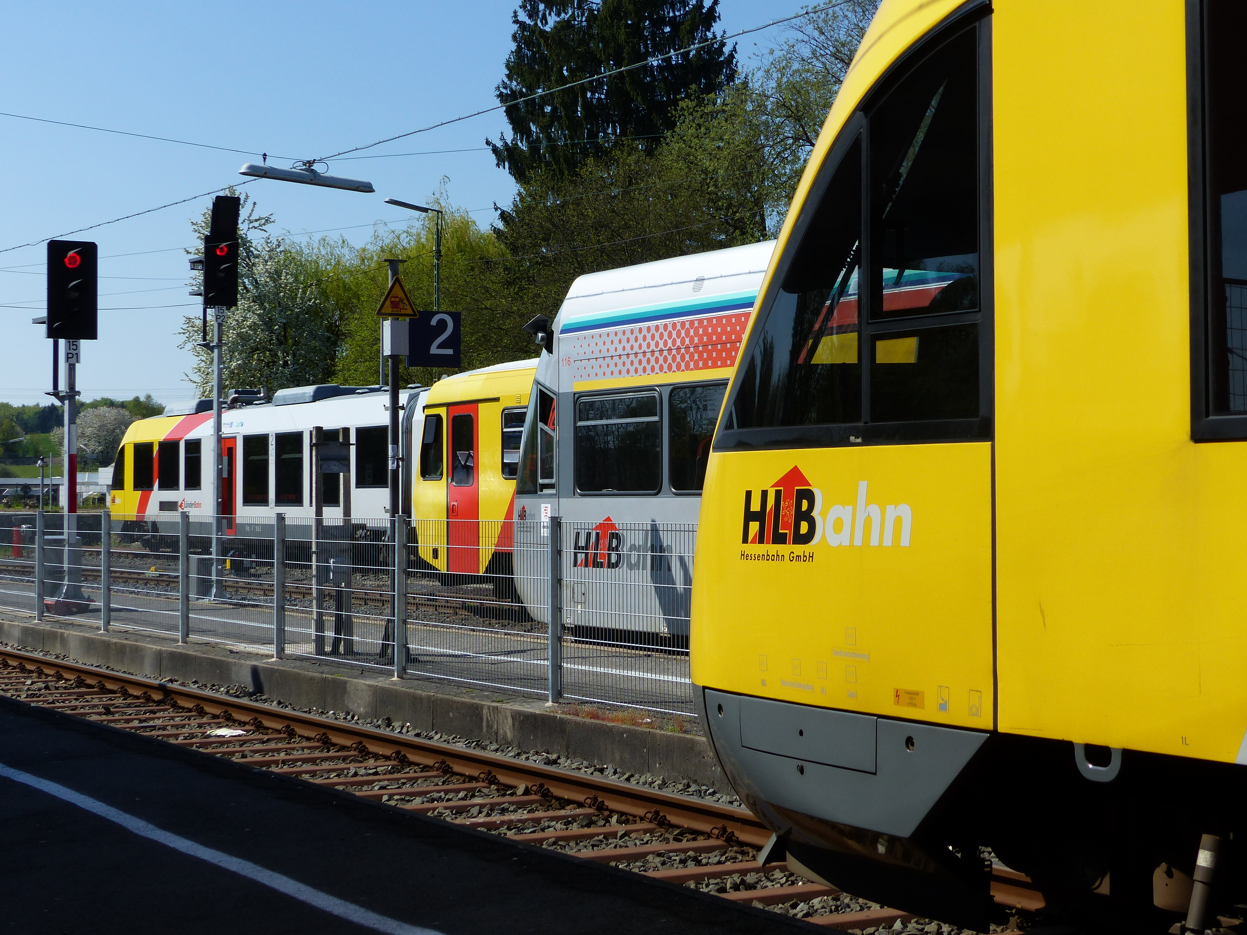 Vier HLB-Triebwagen im Bahnnhof Westerburg